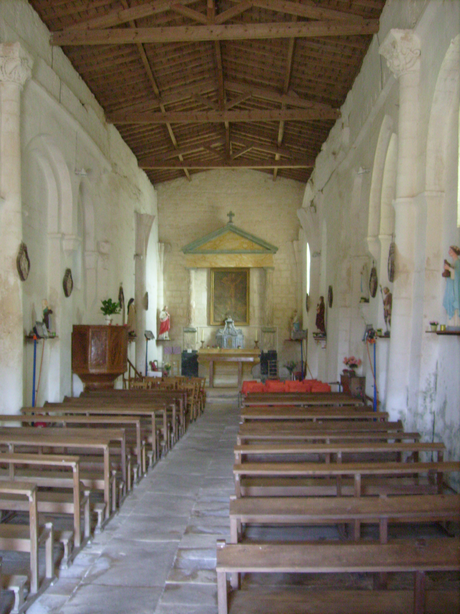 Eglise de La Clisse : intérieur